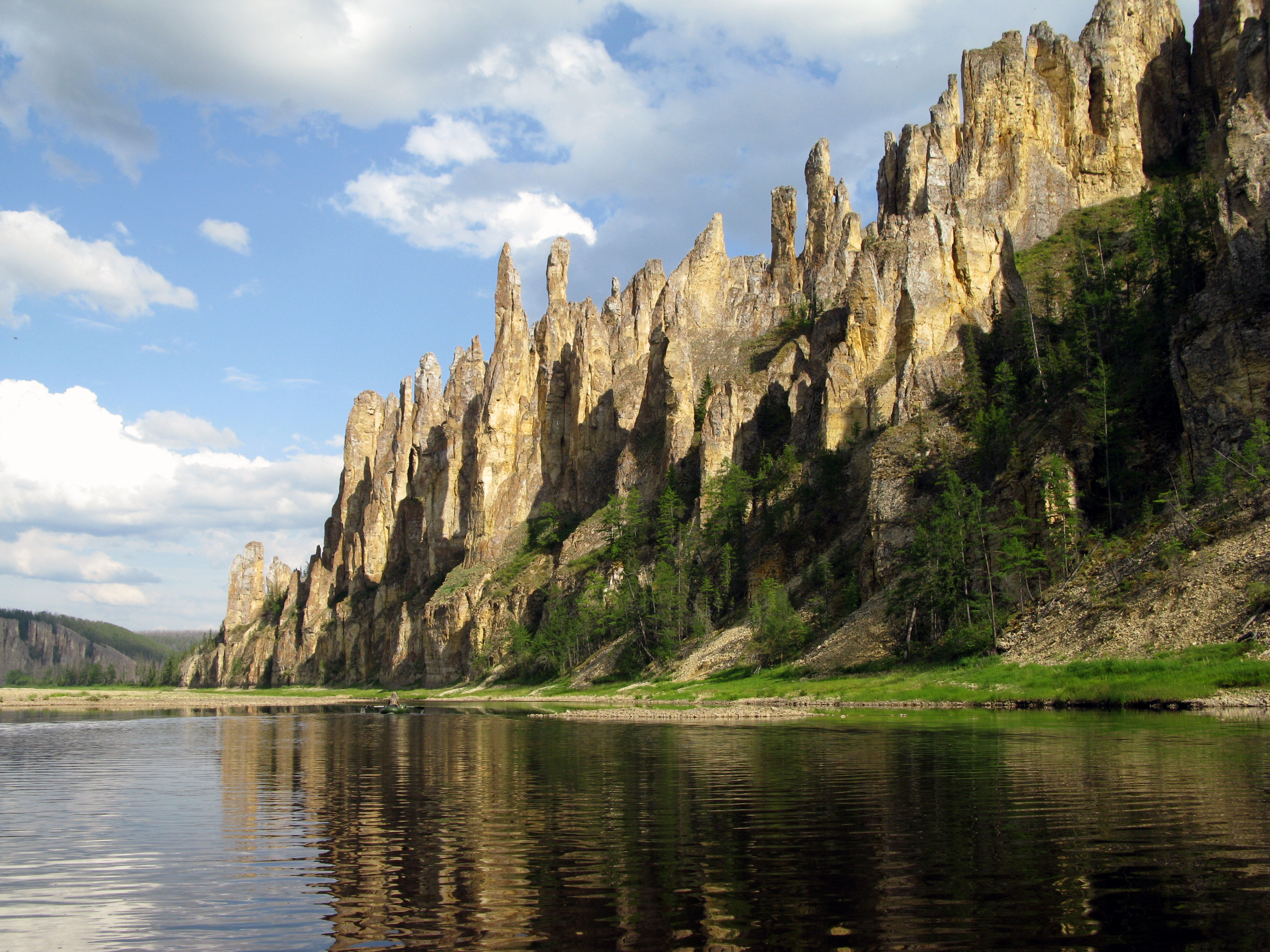 Природный парк "Синские столбы".